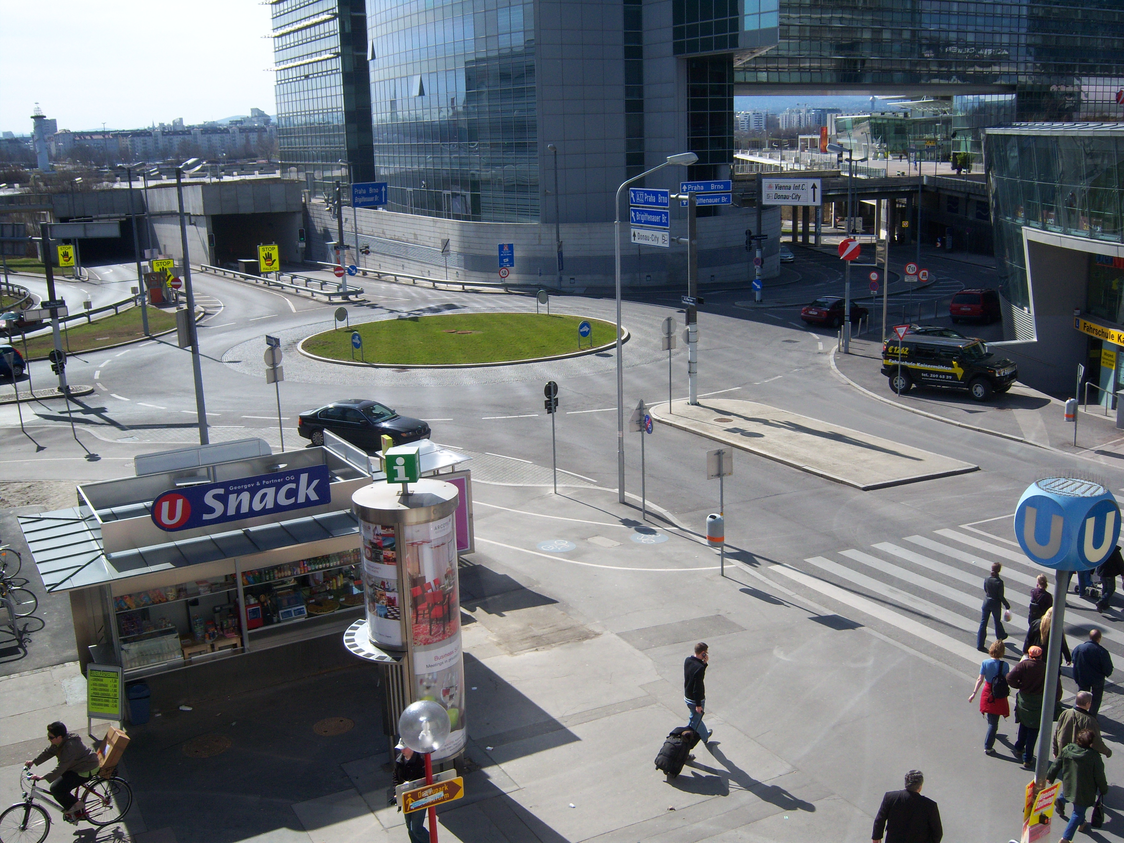 Station Kaisermühlen